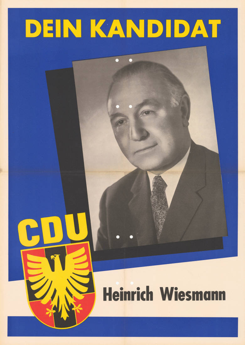 Dein Kandidat CDU Heinrich Wiesmann Abbildung: Porträtfoto - CDU-Logo Plakatart: Kandidaten-/Personenplakat mit Porträt Objekt-Signatur: 10-009 : 373 Bestand: Landtagswahlplakate Nordrhein-Westfalen (10-009) GliederungBestand10-18: Landtagswahlplakate Nordrhein-Westfalen (10-009) » Landtagswahl am 6.7.1958 » CDU » mit Porträt-Foto Lizenz: KAS/ACDP 10-009 : 373 CC-BY-SA 3.0 DE